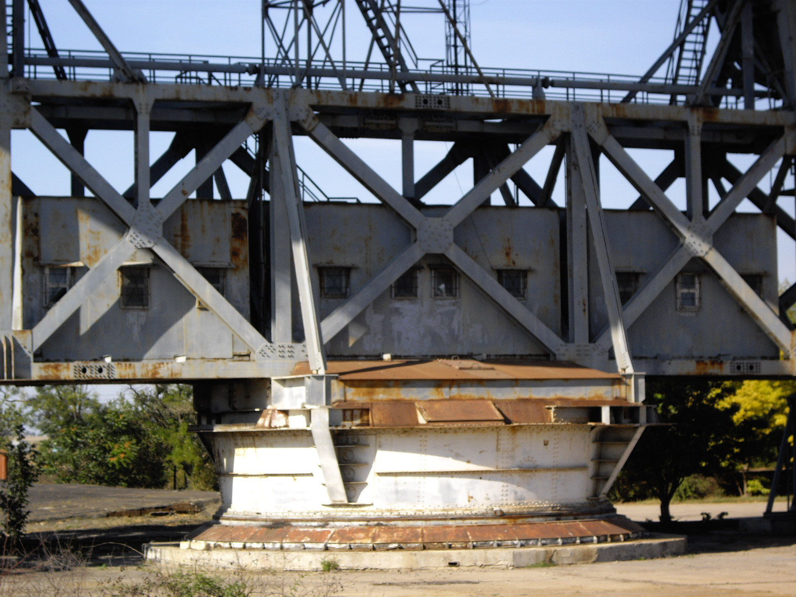 АДУ-1000(К1). Поворотные устройства 305-мм орудийных башен с линкоров типа "Сталинград" на бетонном основании.